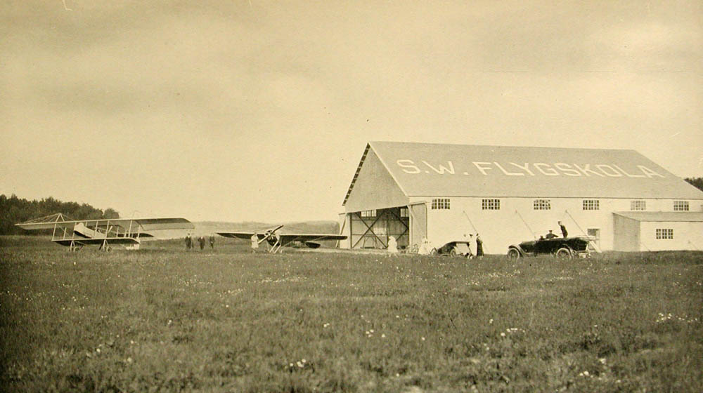 Flygskolan vid Södertelge Werkstäder